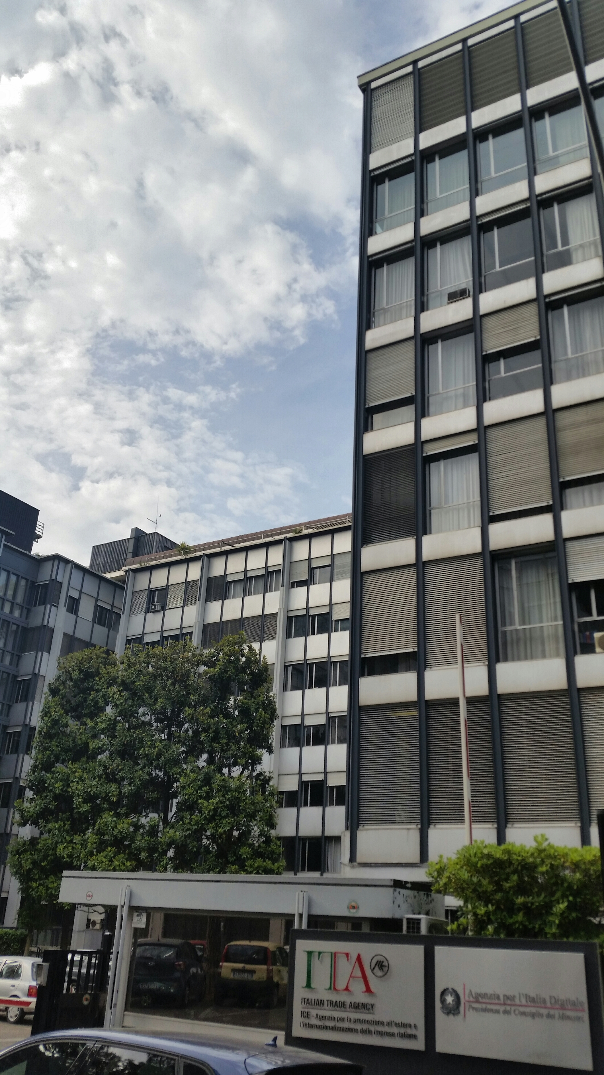 Sede AGID. Sede ICE (ITA)